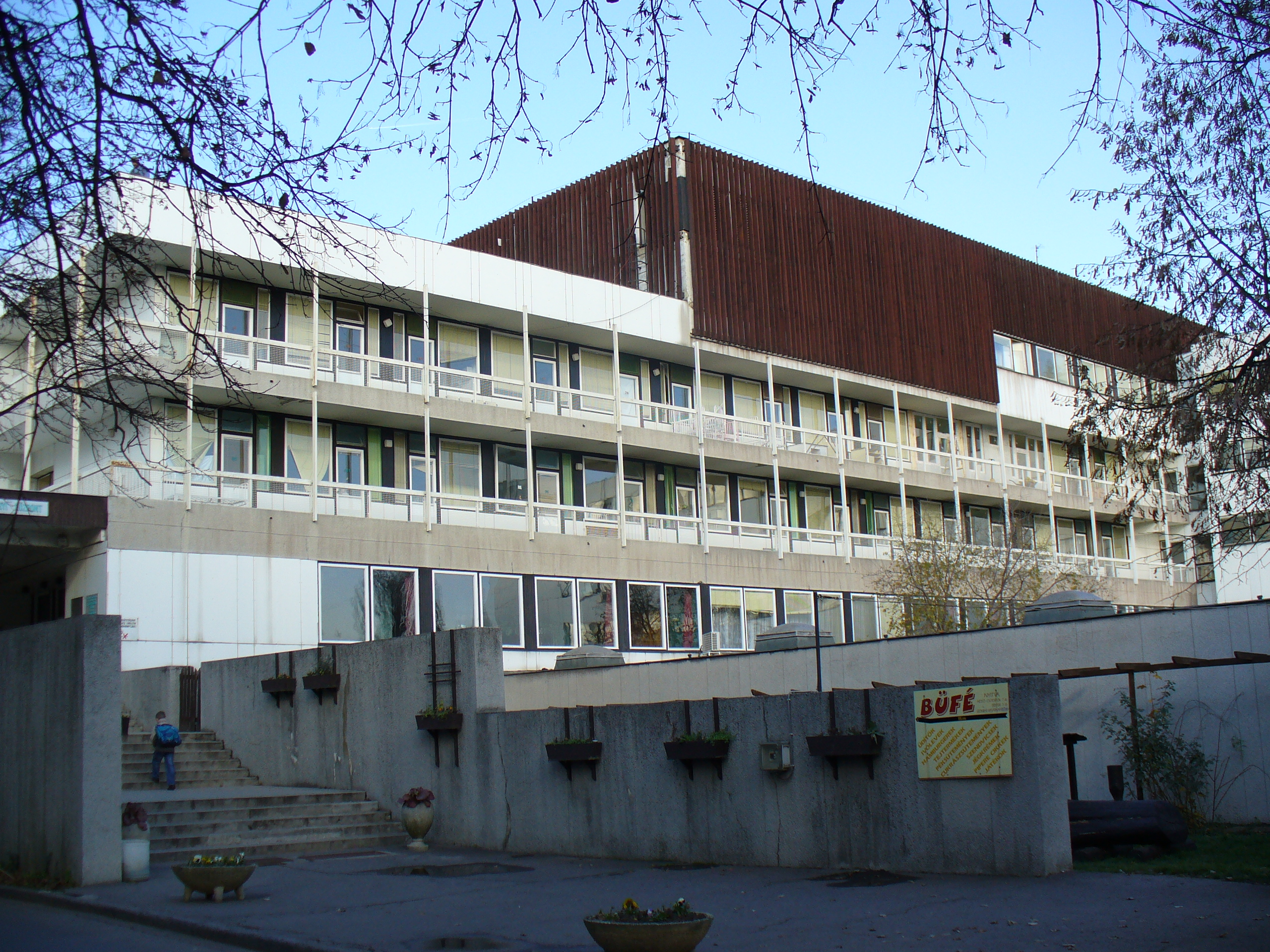 A miskolci gyermekkórház épülete. Tervező:Farkasdy Zoltán (1967–75)